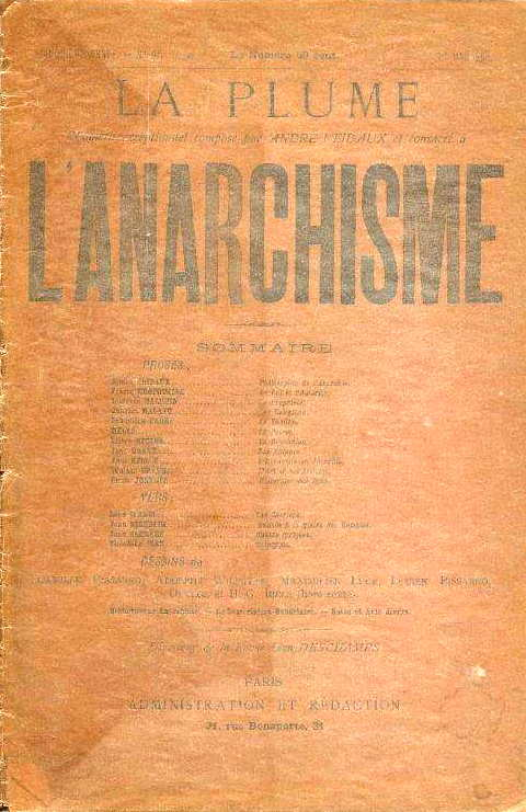 La Plume, numéro exceptionnel composé par André Veidaux consacré à L’Anarchisme, n°97, 1er mai 1893.